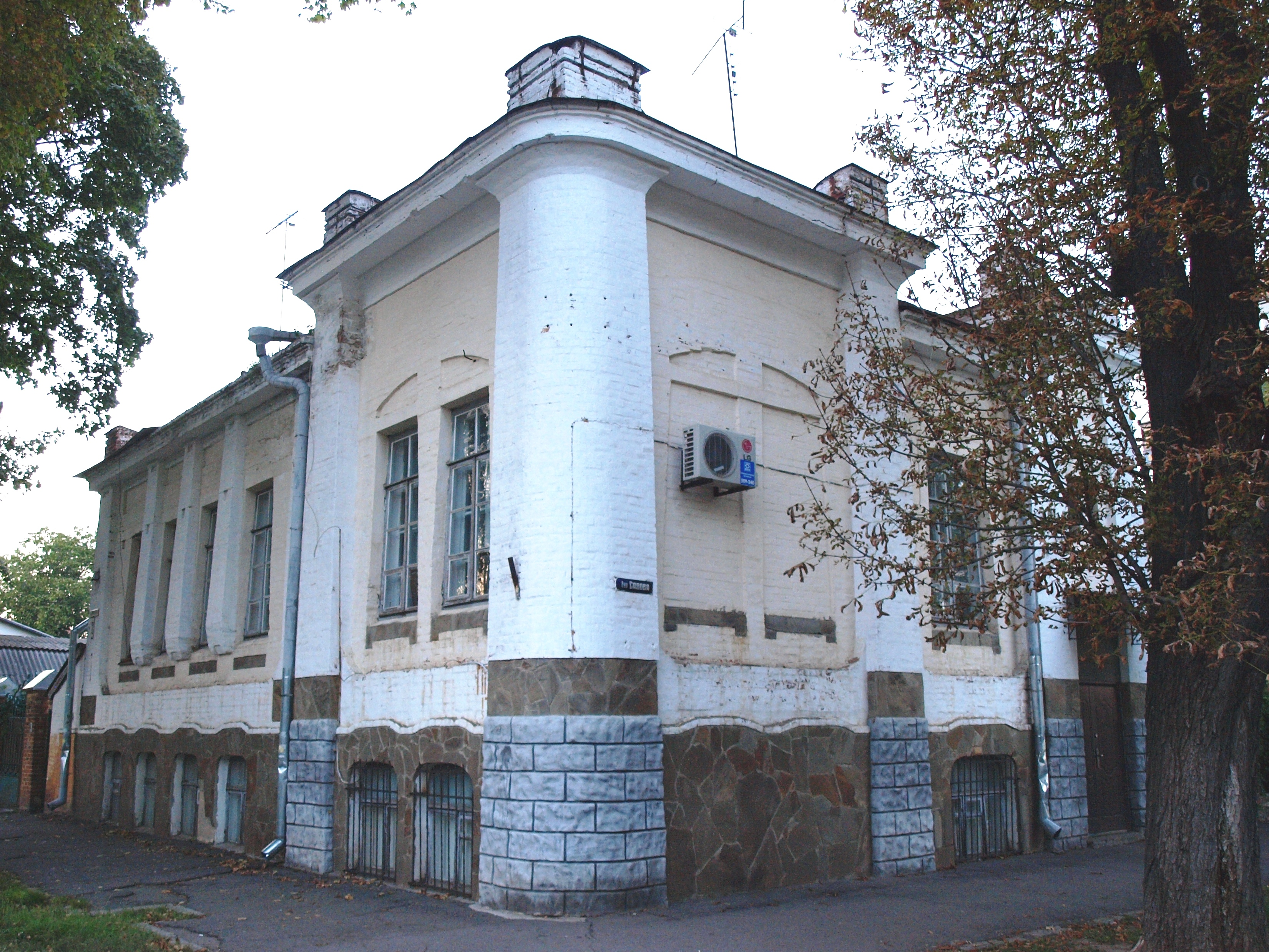 Міський особняк (Житловий будинок)